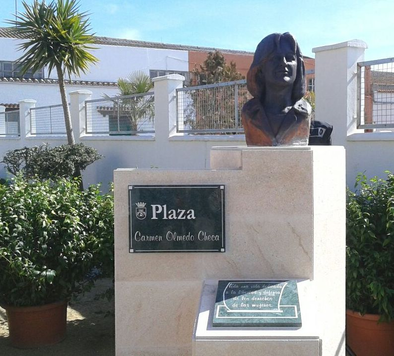 Plaza Carmen Olmedo Checa en Chiclana de la Frontera (Cádiz).